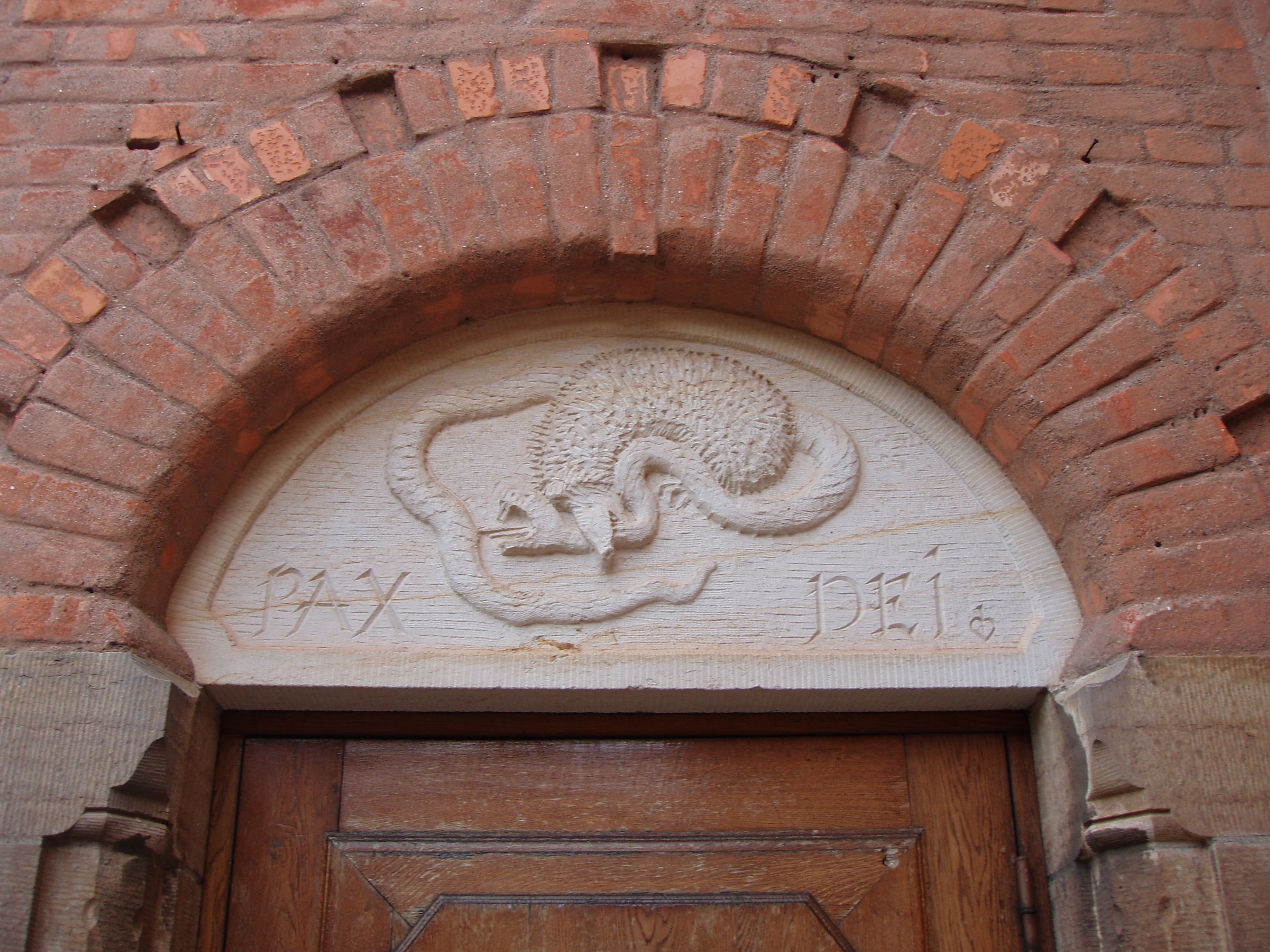 Villa Högberga, Lidingö. Detalj ovanför entrén till receptionen. Igelkotte som fångat en orm. Texten PAX DEI betyder Guds fred. Design: Skulptören JAG Acke.